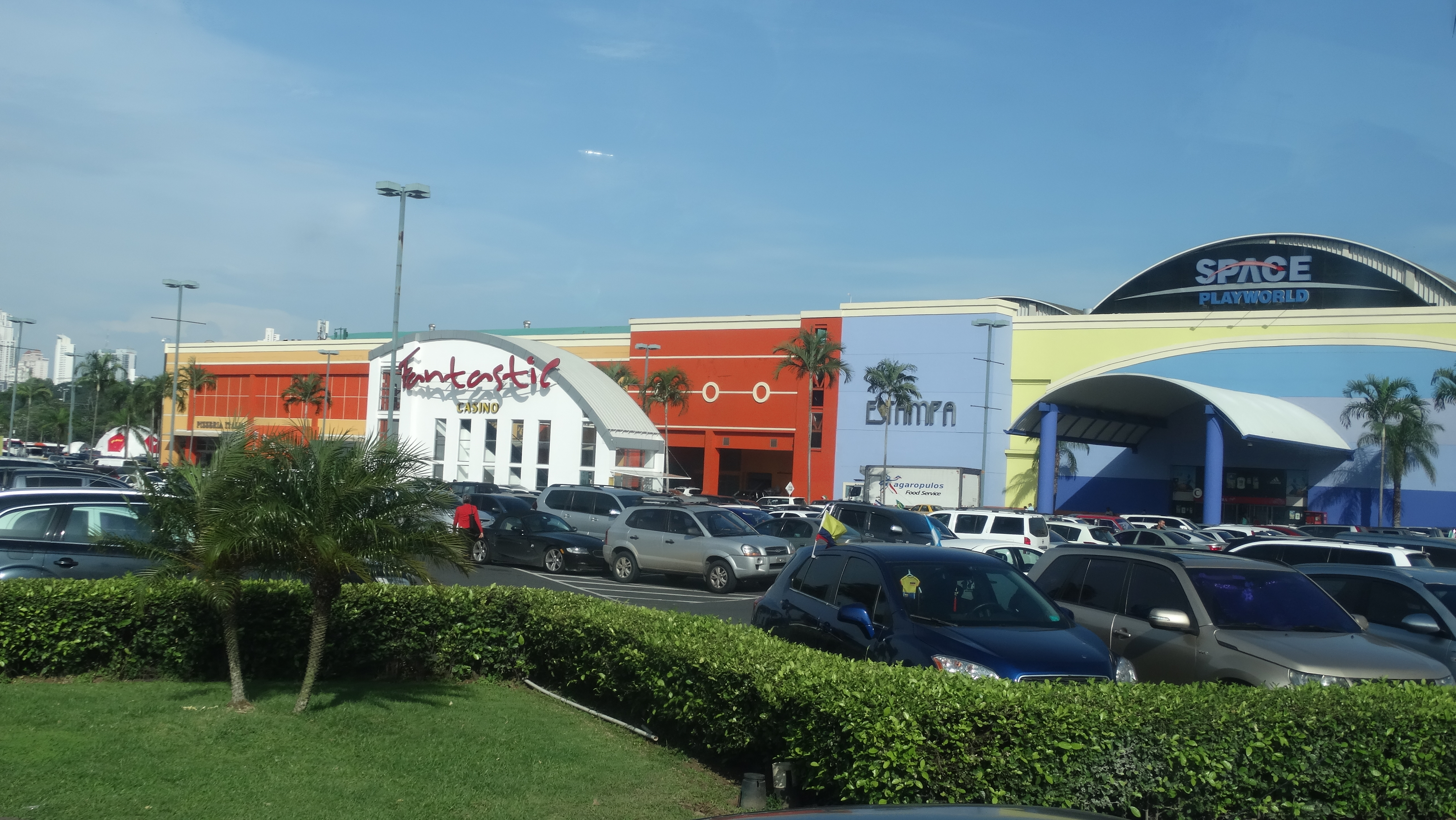 Panama - Albrook Mall